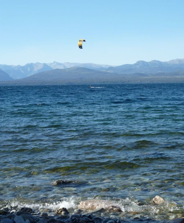 zona este